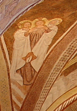 Dreifaltigkeitsfresko im Chor der Kirche Sankt Jakobus in Urschalling